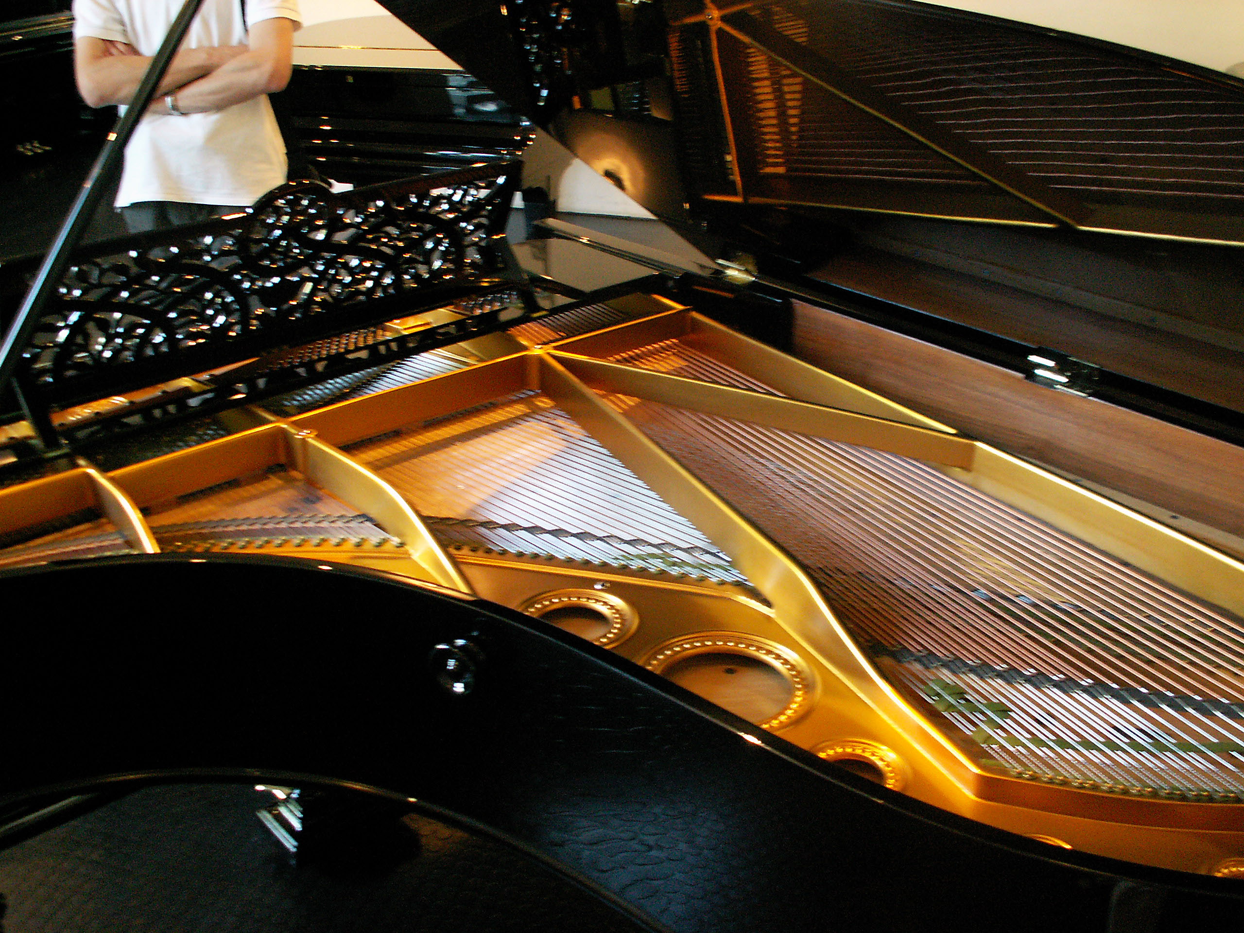 Wnętrze (dźwięcznica) fortepianu marki Bechsein.